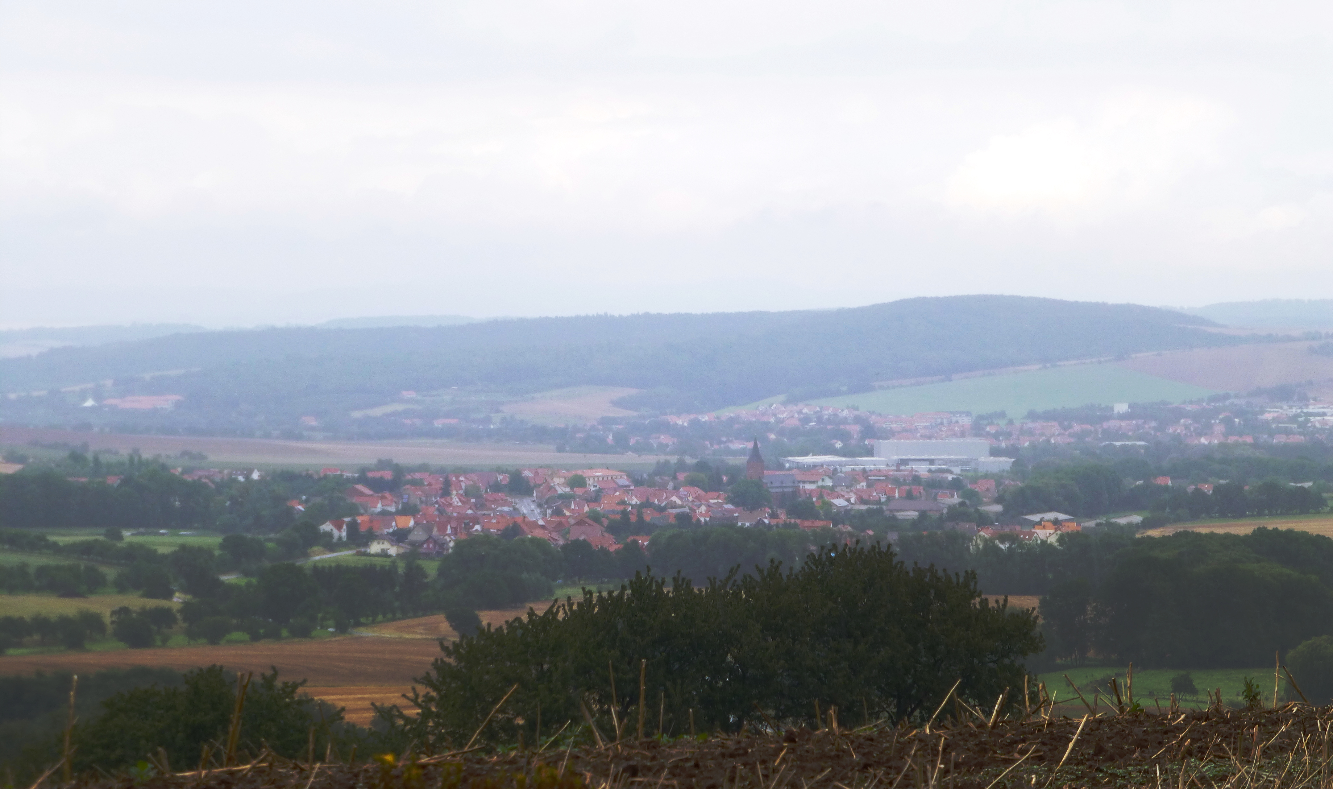 Blick vom Hang des Knorrenkopfs (Roter Berg) auf Berlingerode und Teistungen (im Hintergrund der Lindenberg)